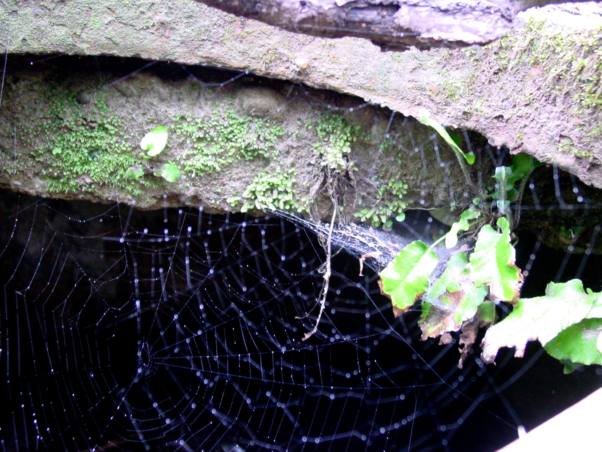 Sataphlia, Kutaisi Georgia.